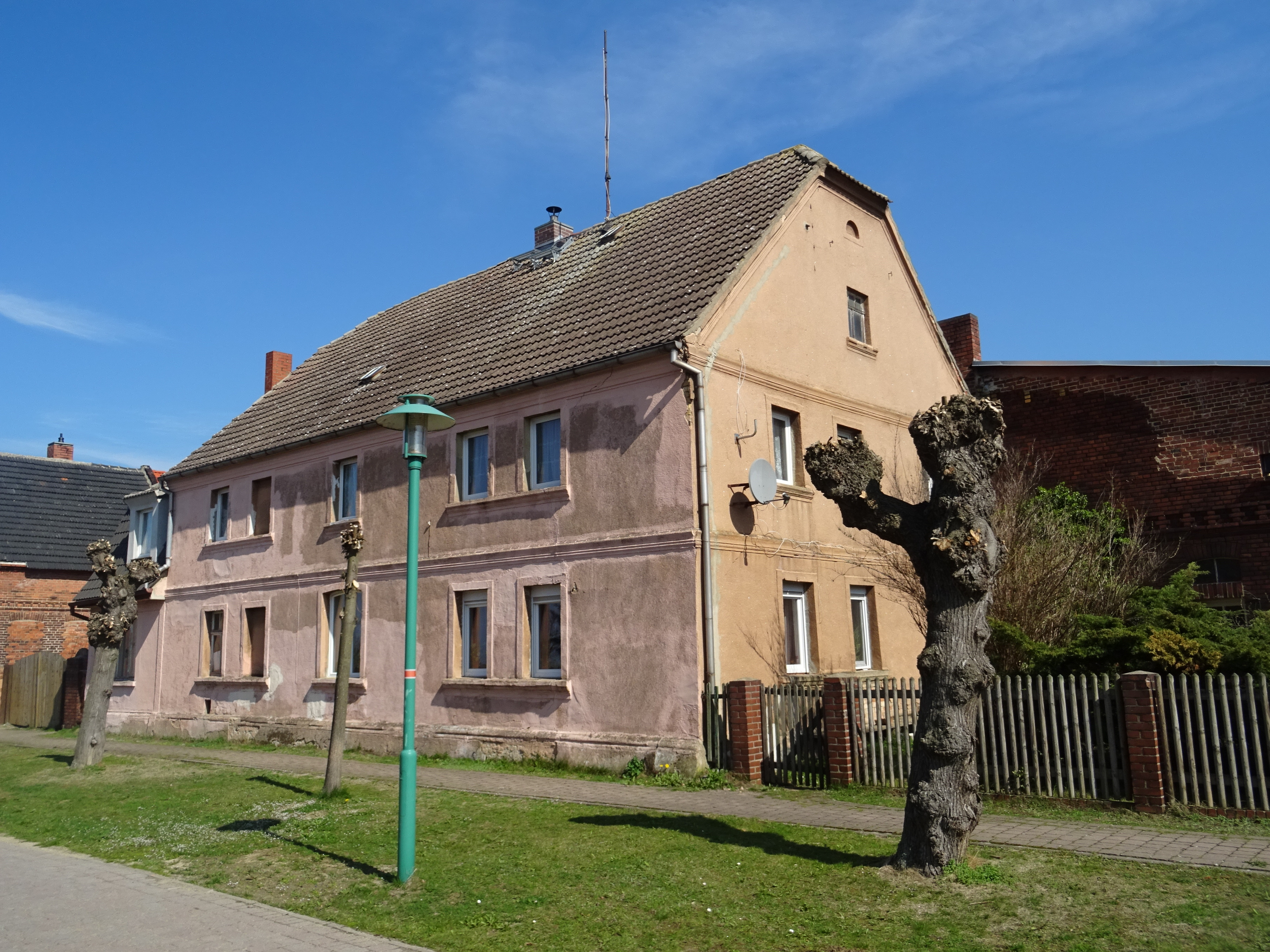 Lammsdorf, Ortsteil von Kemberg Dorfstraße 39/39a, Baudenkmal, größeres Wohnhaus (Dorfstraße 39)